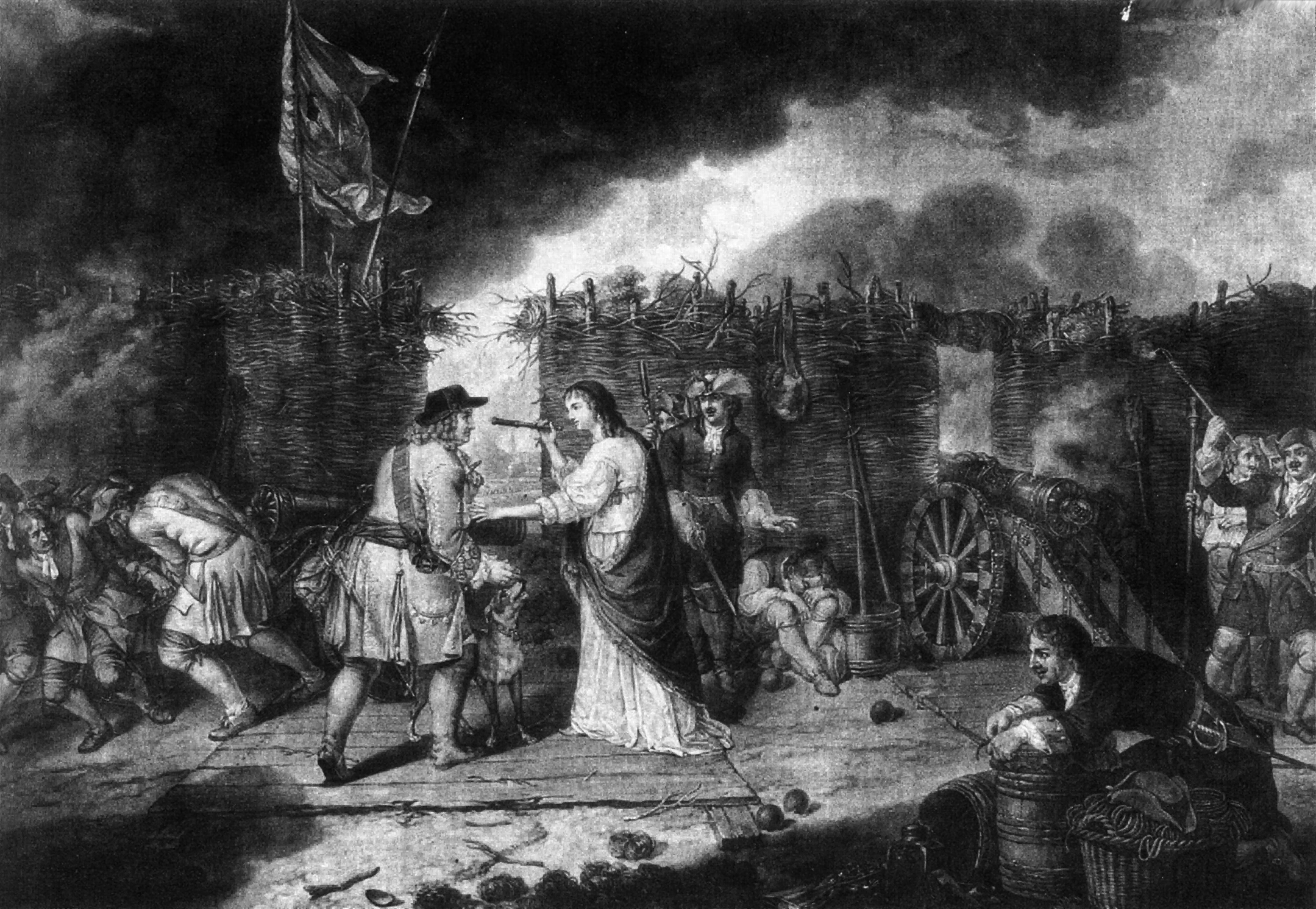 Schabkunstblatt von Johann Joseph Friedhoff nach einem Gemälde von Friedrich Georg Weitsch (1800). Berlin